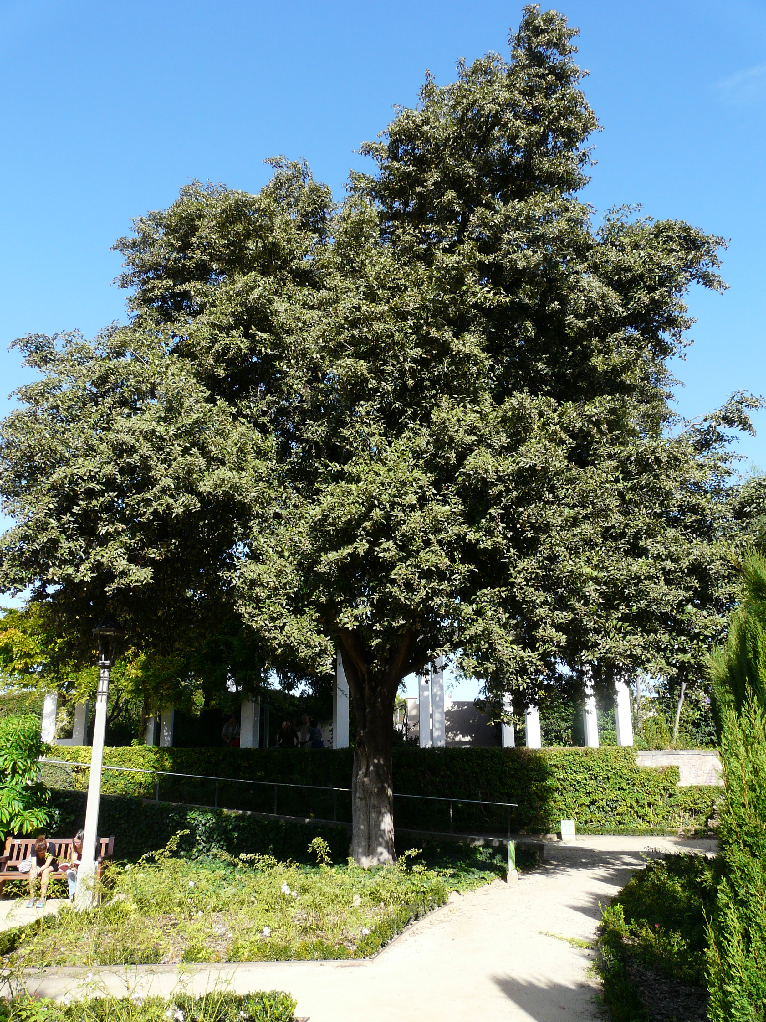 Lagunària del Teatre Grec, Montjuïc (Barcelonès) (Barcelona). Lagunaria patersonii. No homologat. This is a a photo of a protected or outstanding tree in Catalonia, Spain, with id: MA-13.931.01 Object location41° 22′ 11.28″ N, 2° 09′ 34.02″ E